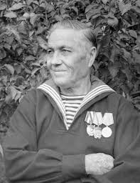 Іван Акімович Личєв